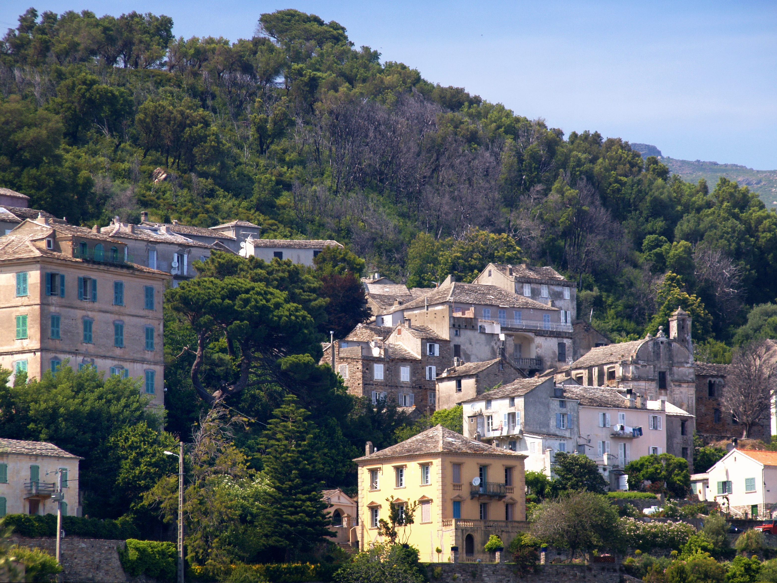 Brando, Cap Corse (Corse) - Le hameau de Pozzo avec la chapelle Saint-Jean-Baptiste (San Giovanni-Battista).